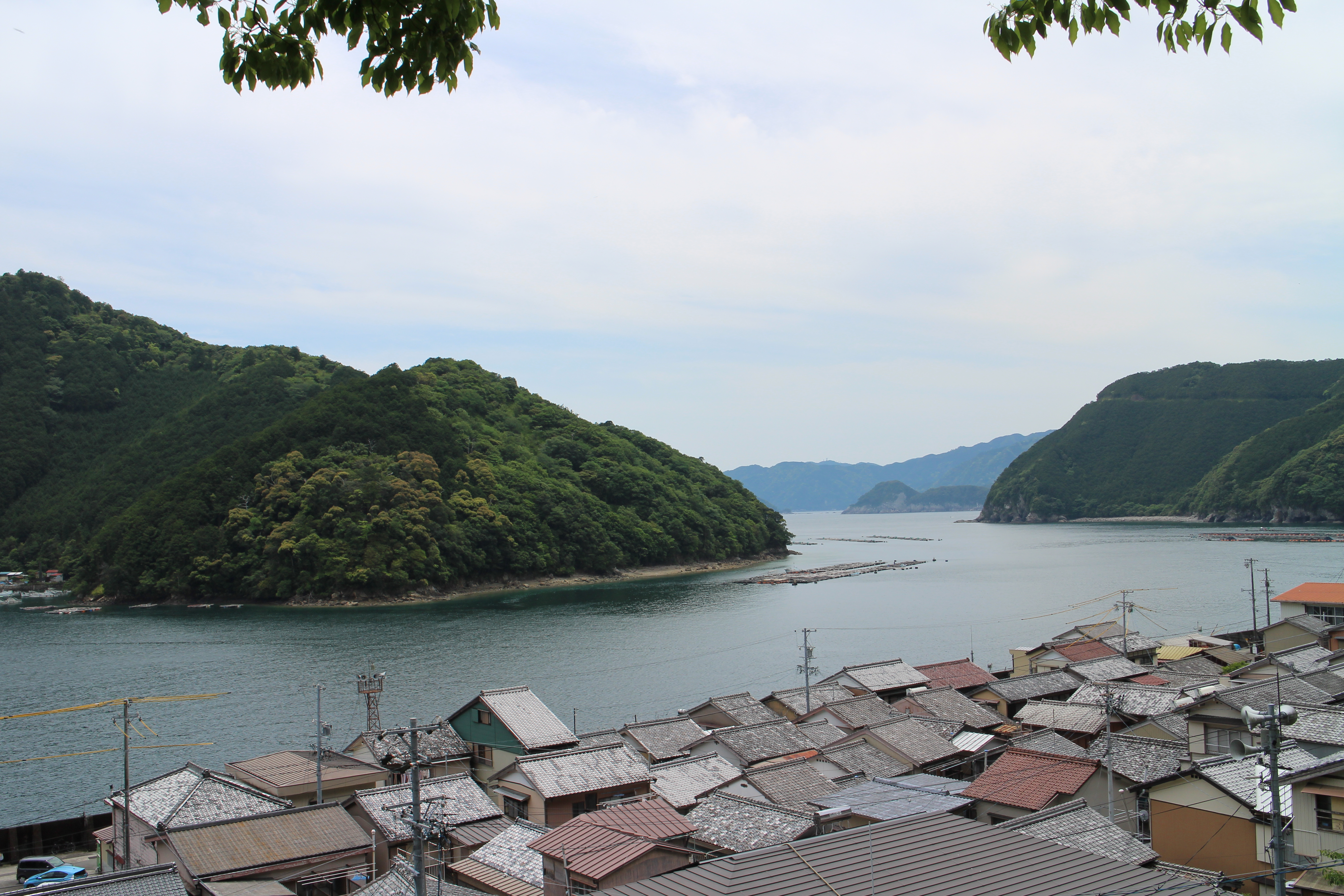 三重県尾鷲市須賀利町